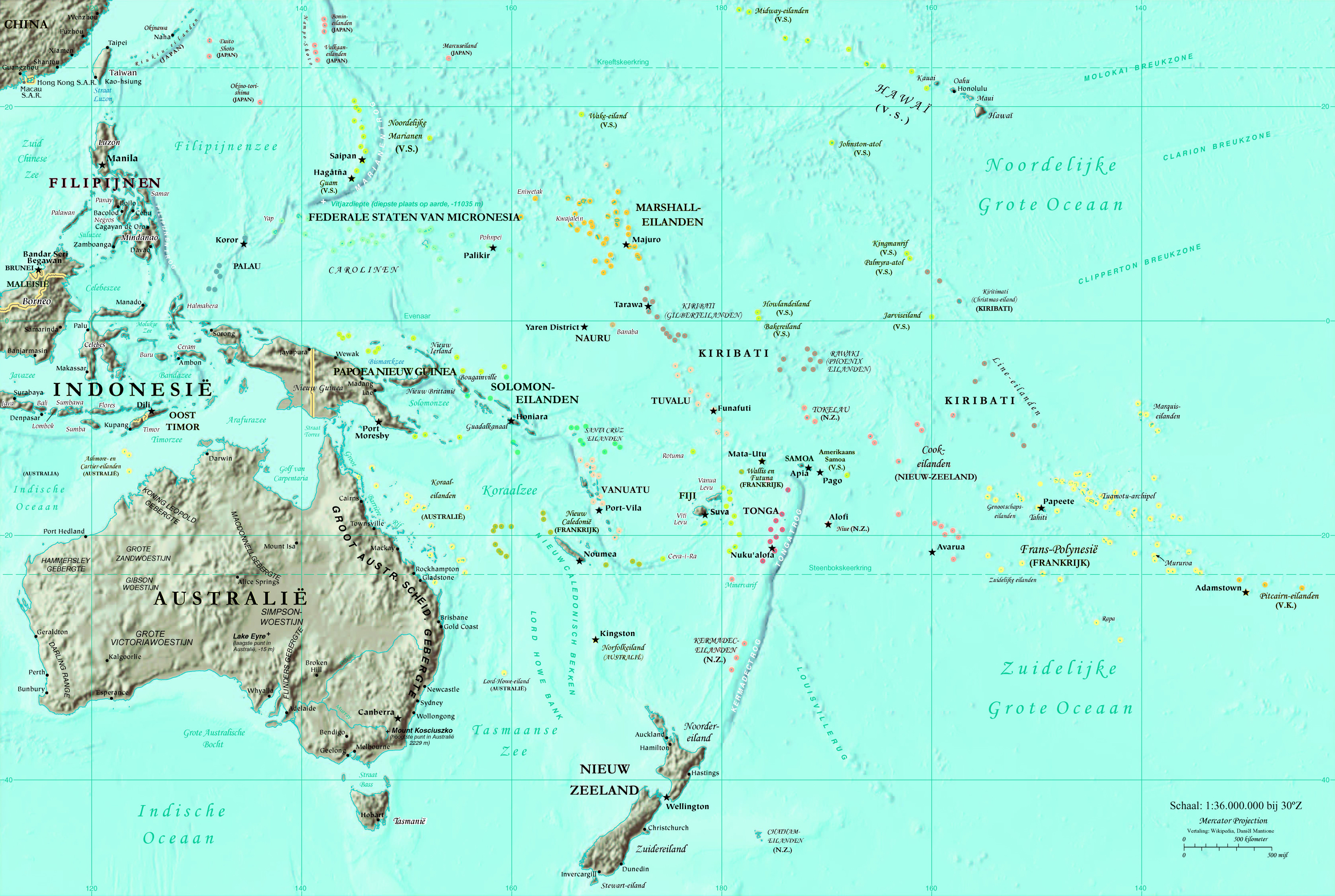 Nederlandse vertaling CIA-kaart door Gebruiker:Danielm Gerenderd op 250 DPI.